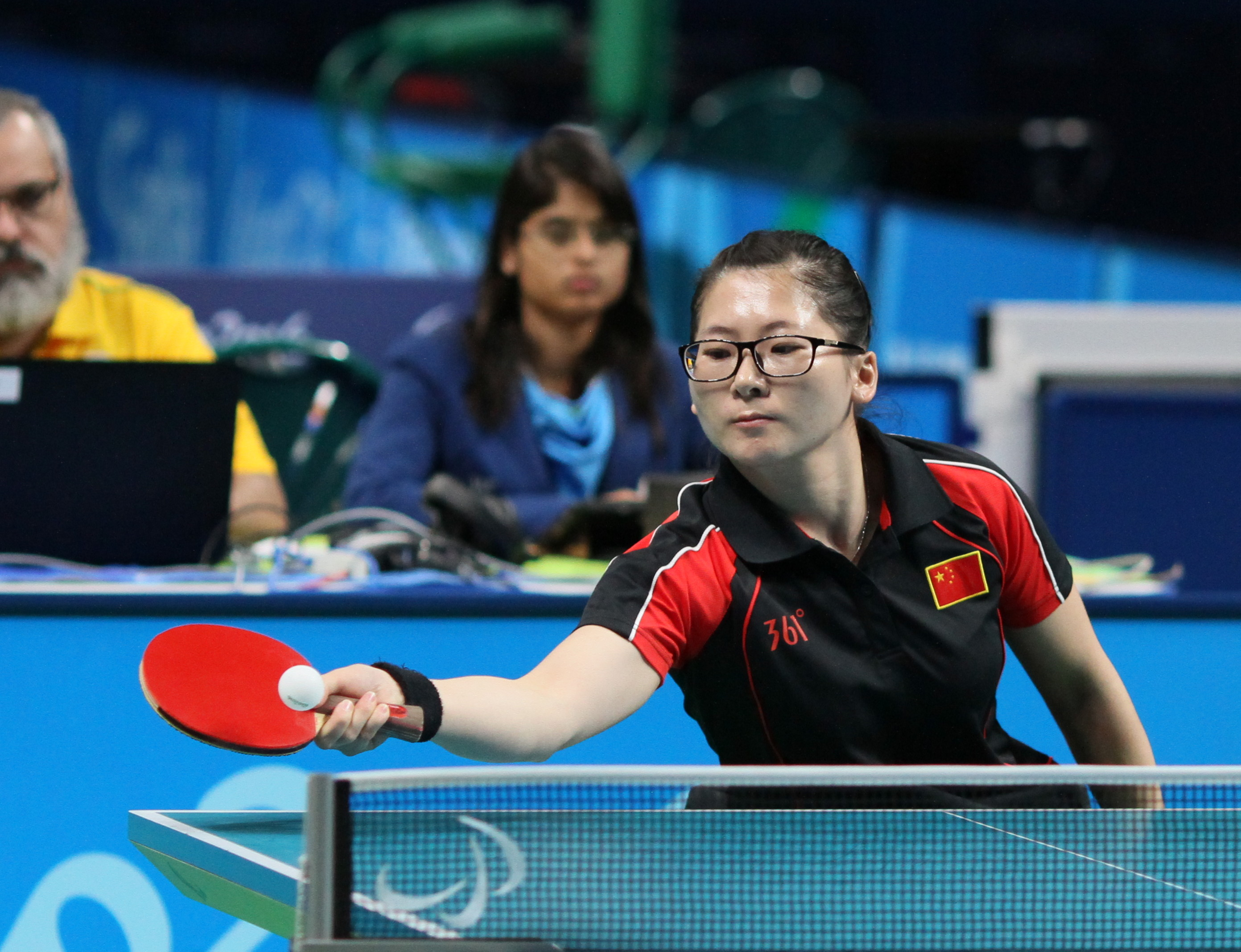 GU Gai (CHN,F5) IMG_5498